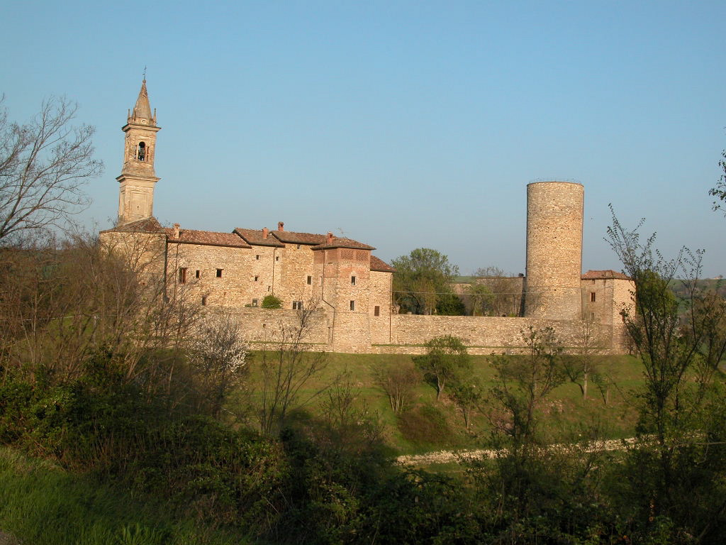 Foto mia personale, il castello di Monteventano, 2006